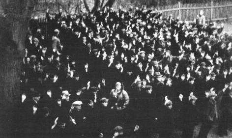 Akcja krzesińska - katowanie Polaków przez hitlerowców 23.11.1940r. przy kościele w Krzesinach w Poznaniu.